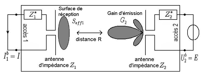 Schéma électrique explicatif.